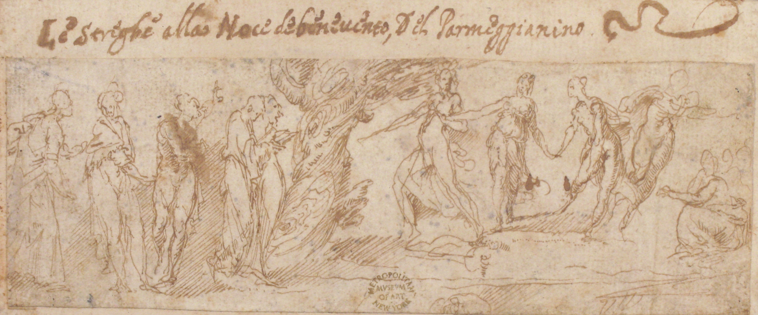 Drawing; Drawings